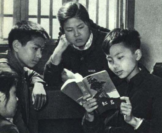 1963-05 1963年 最畅销小说 红岩